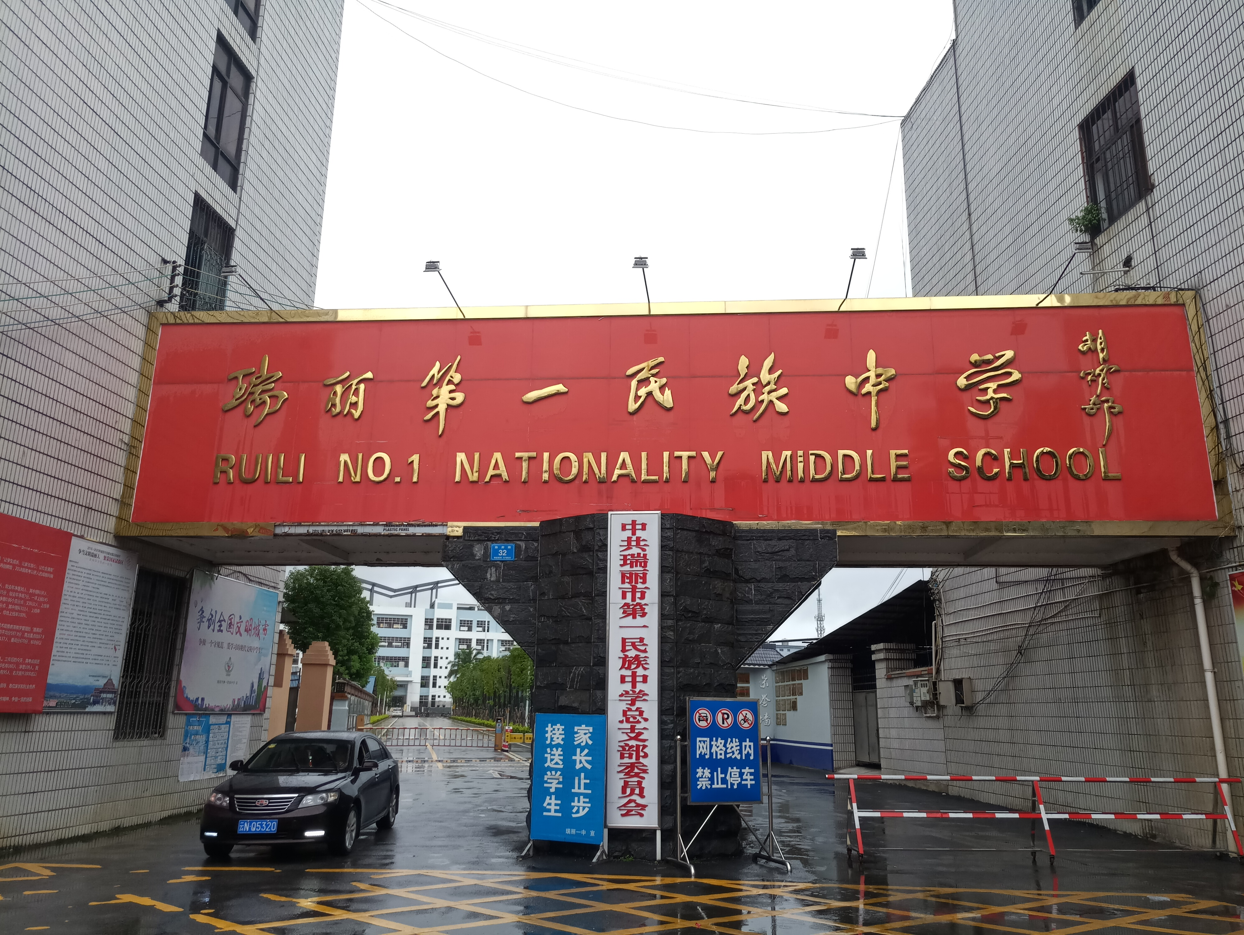 中文（中国大陆）: 瑞丽第一民族中学